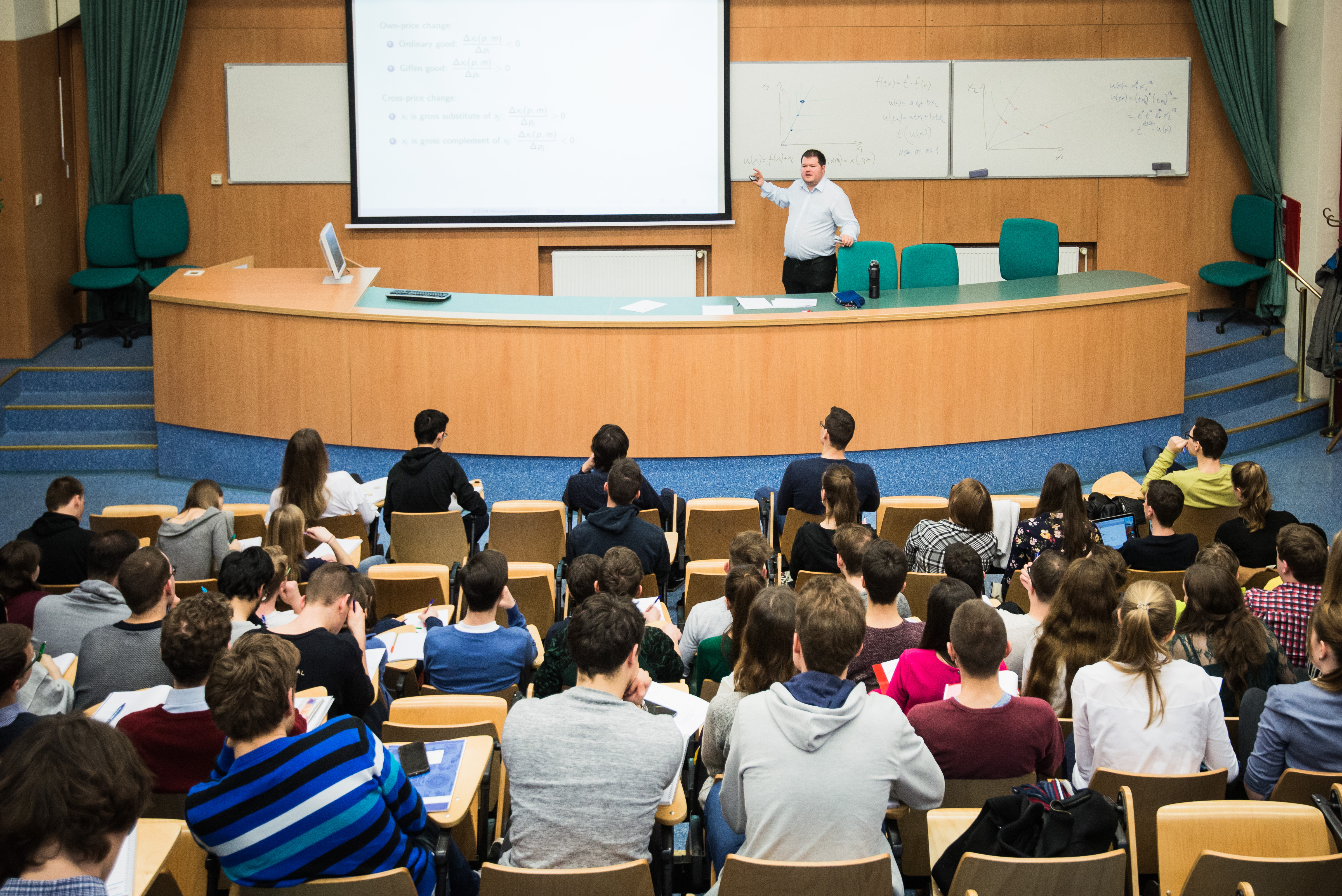 Výuka na IES ve velké aule